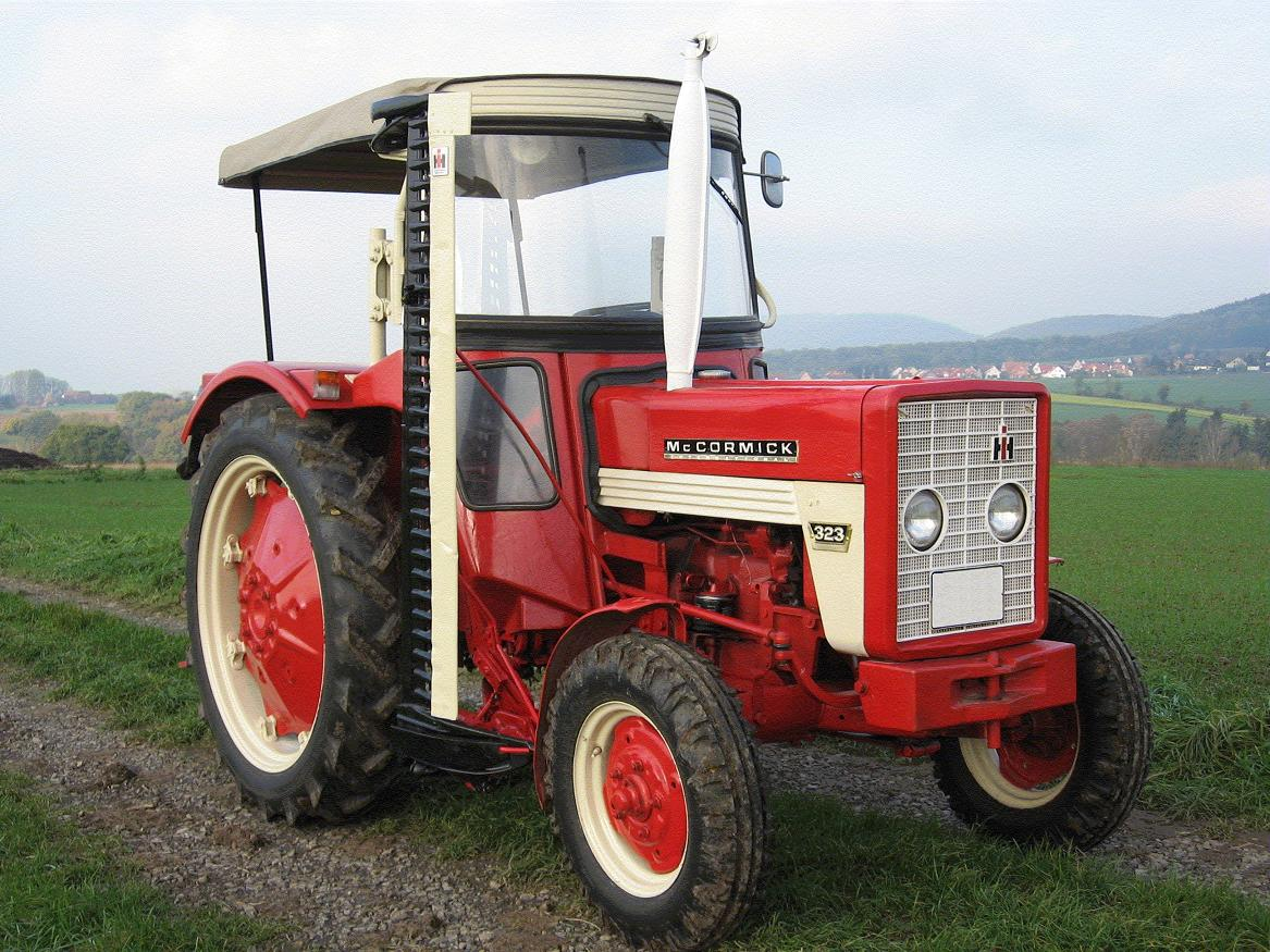 IHC-Traktor McCormick 323 mit Mähbalken